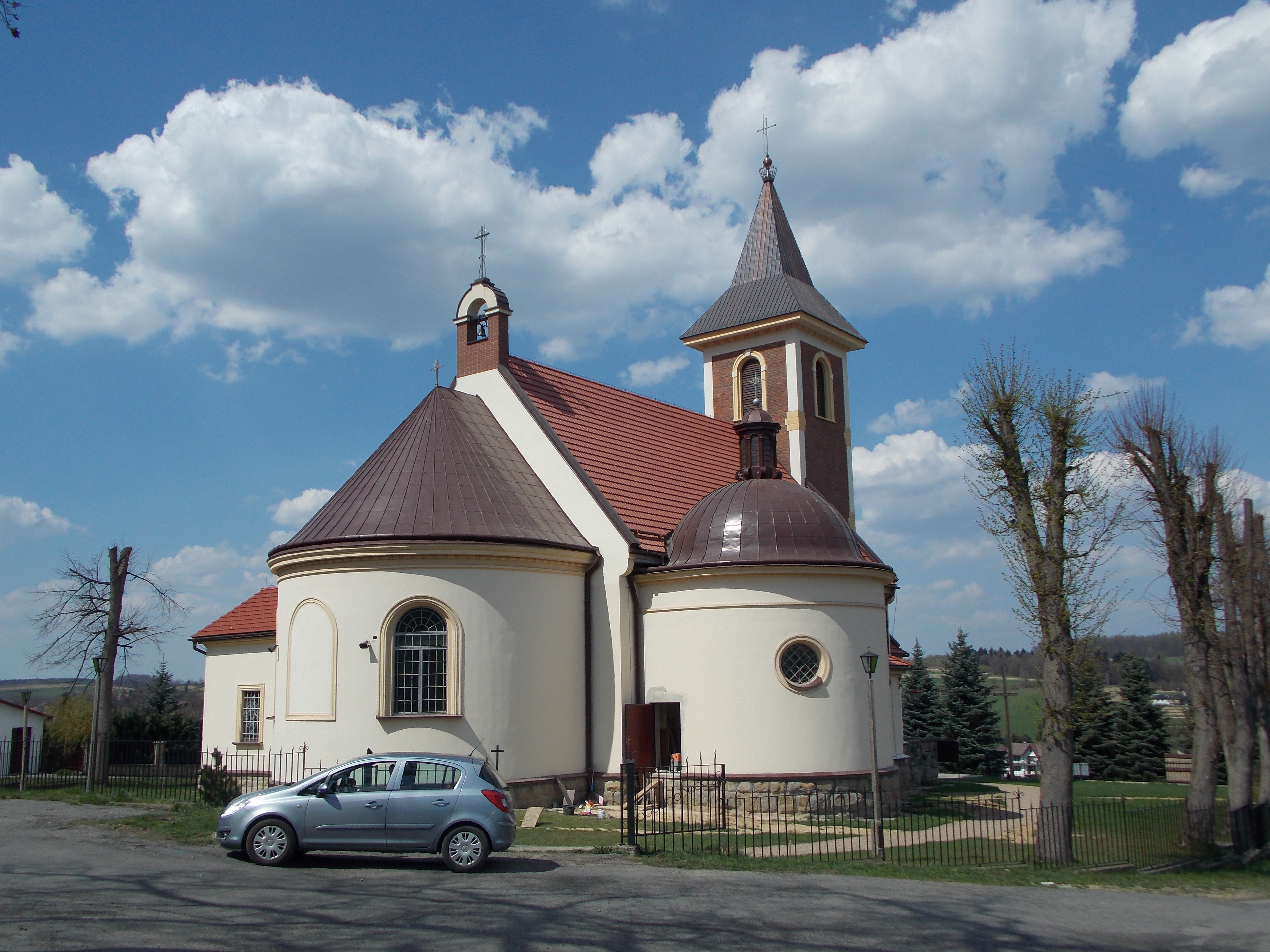 Церковь святой Анны в Закшуве, Вадовицкий повят